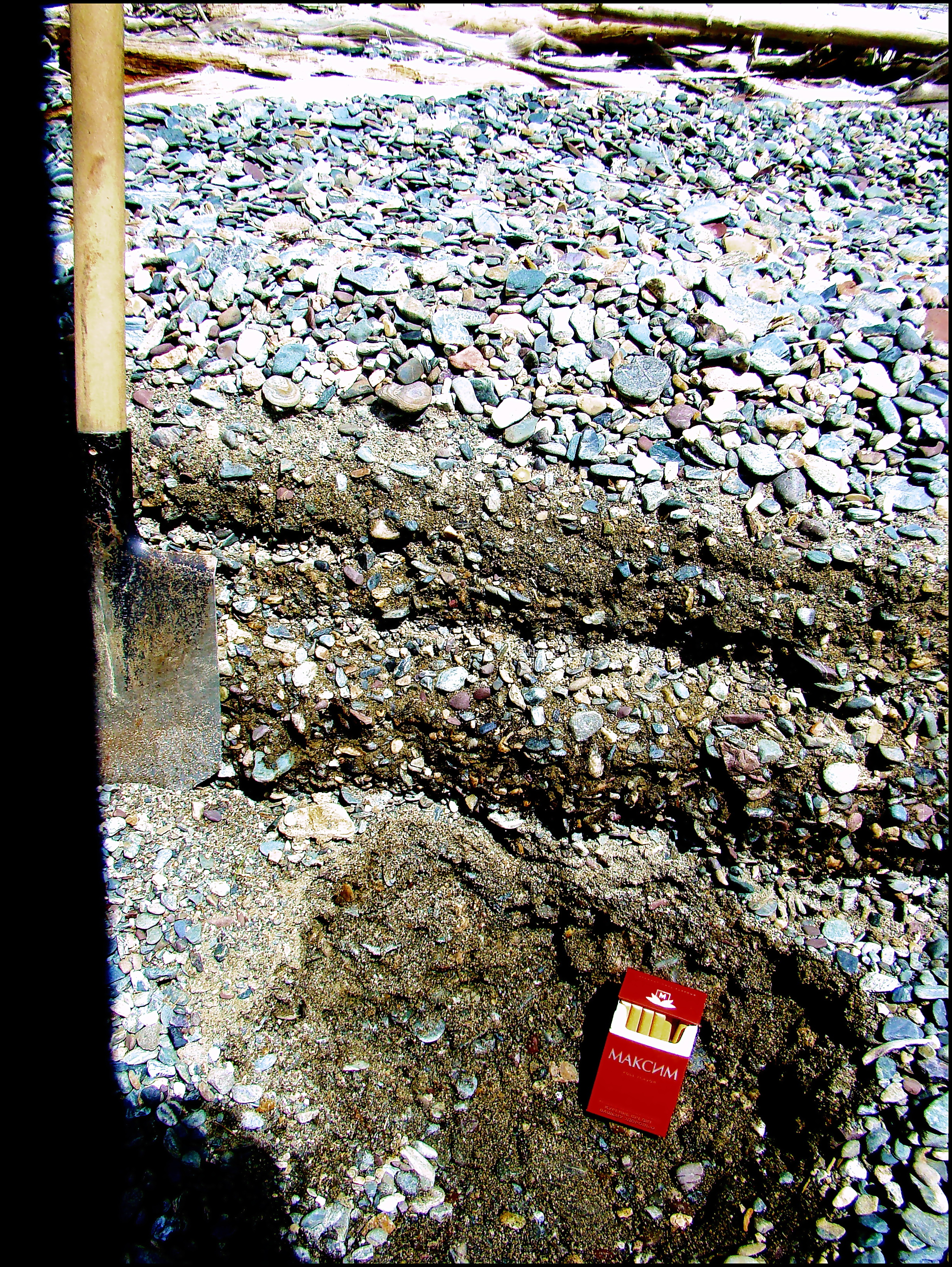 Характер сортированности озёрных отложений в зоне береговых штормов. Фото сделано сразу после шторма. Телецкое озеро, Алтай. Август, 2010.